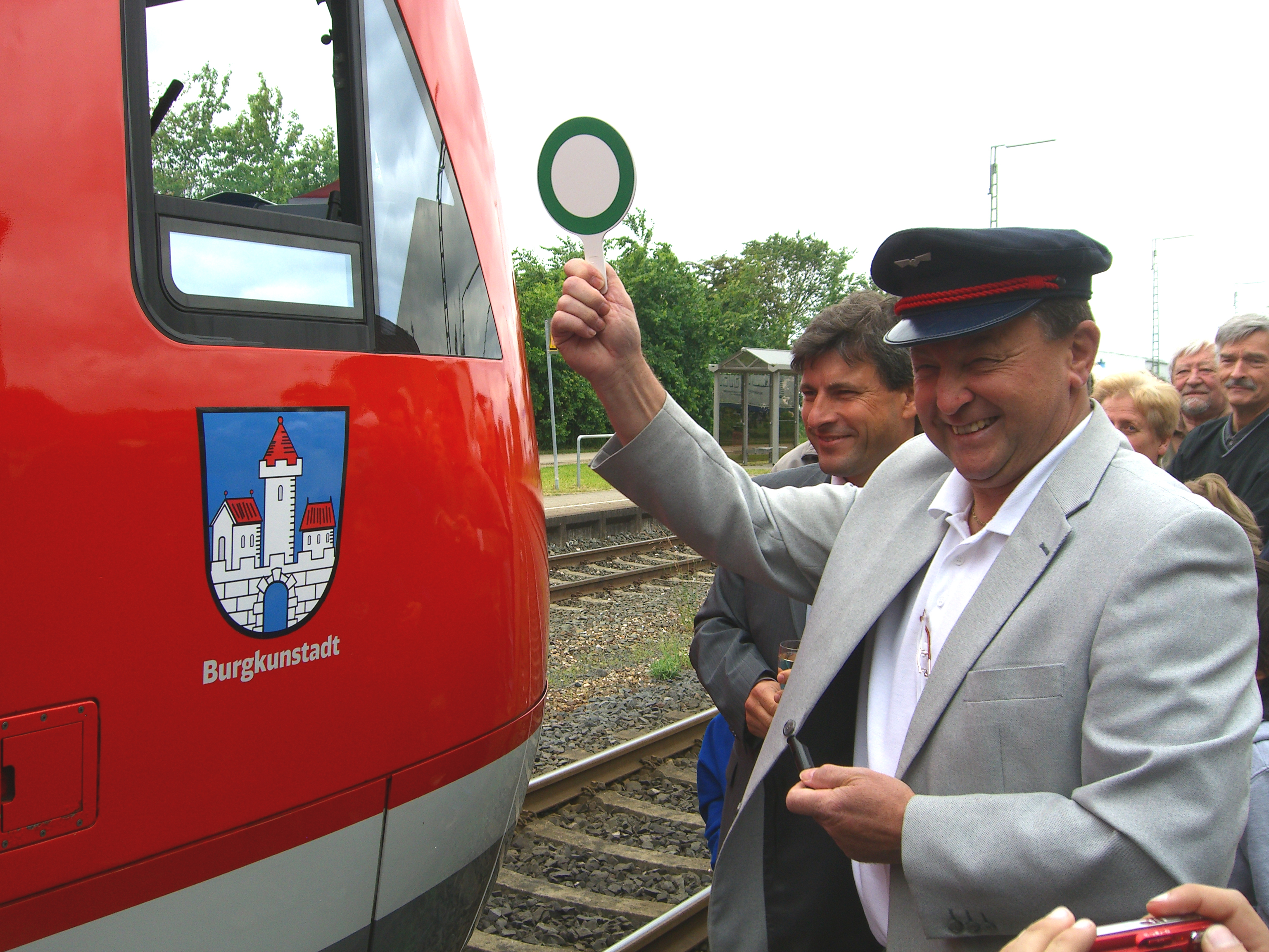 Foto der Zugweihe des Zuges Typ VT 612 auf den Namen "Stadt Burgkunstadt", zusammen mit Burgkunstadts 1. Bürgermeister, Heinz Petterich.